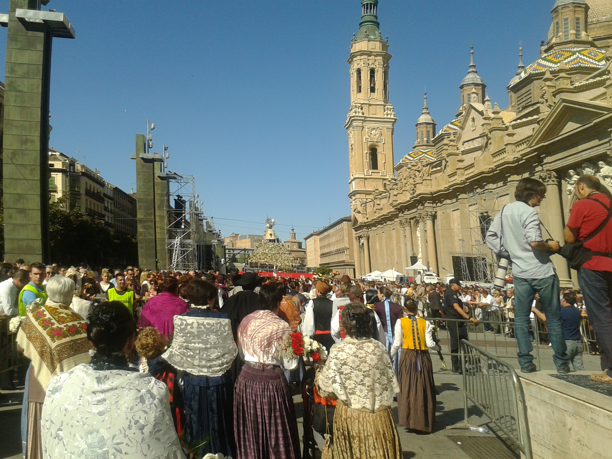 Iglesia Magistral de Nuestra Señora del Pilar